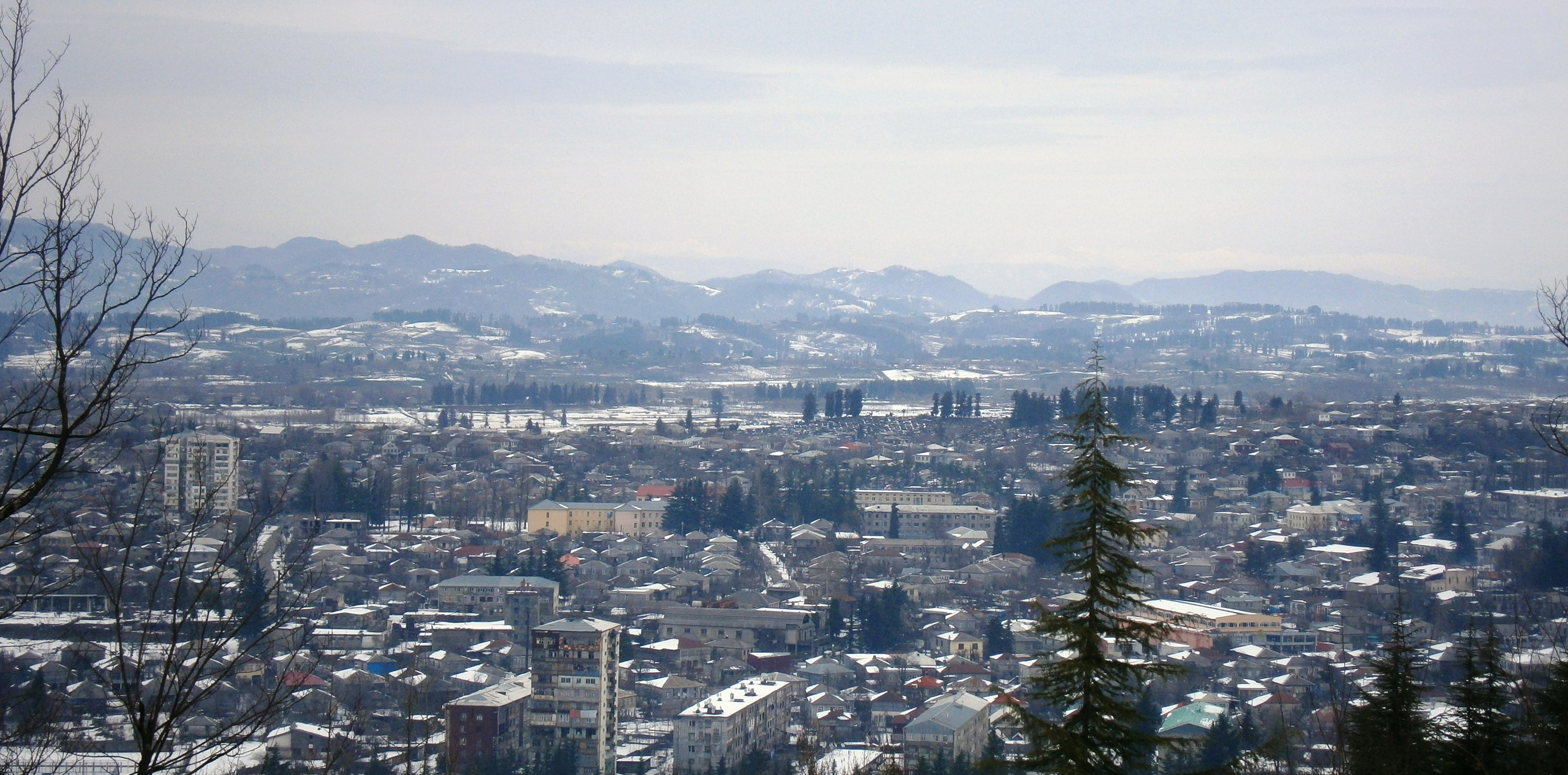 Ozurgeti